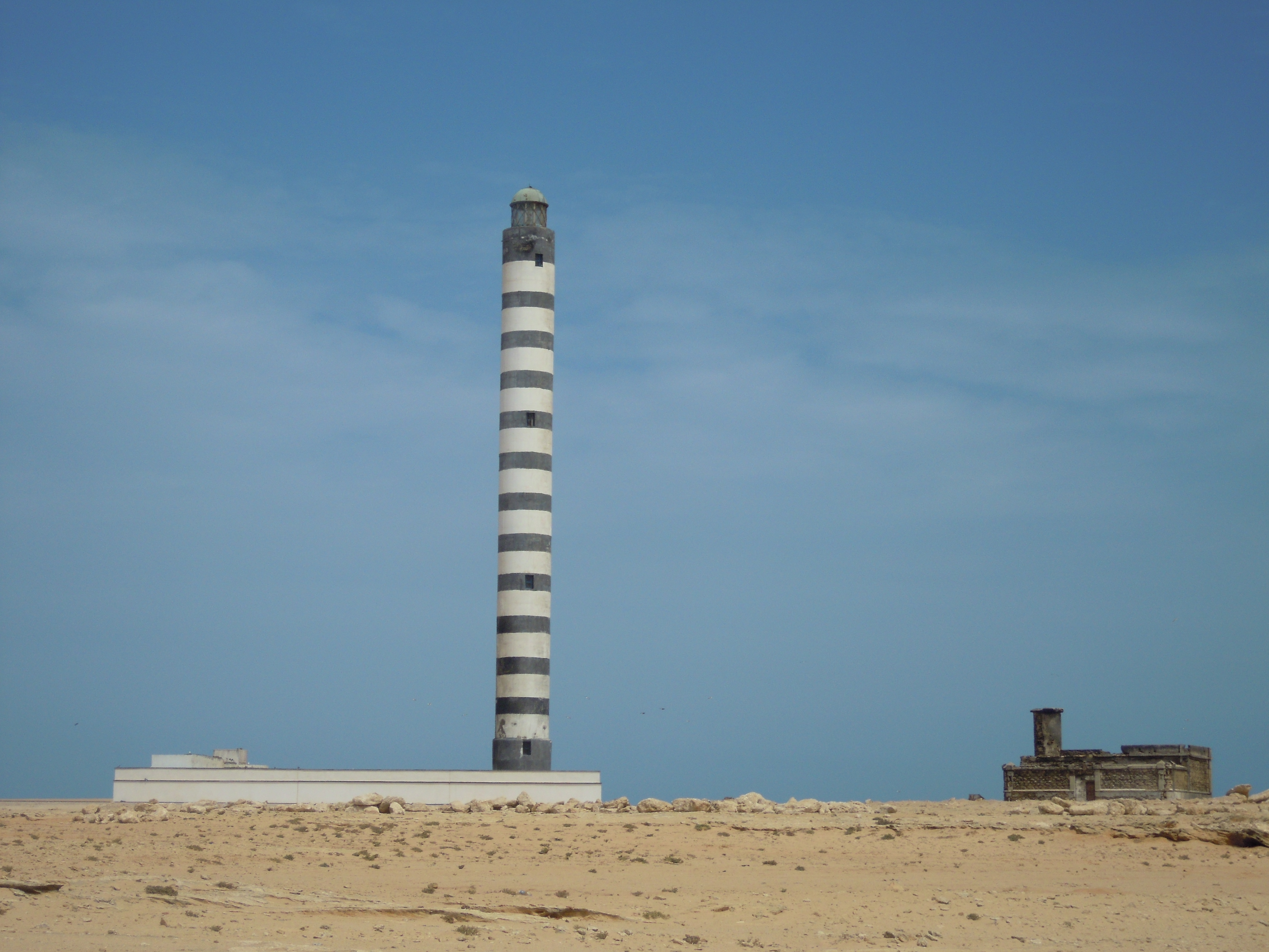 Faros de Dajla, Sahara Occidental